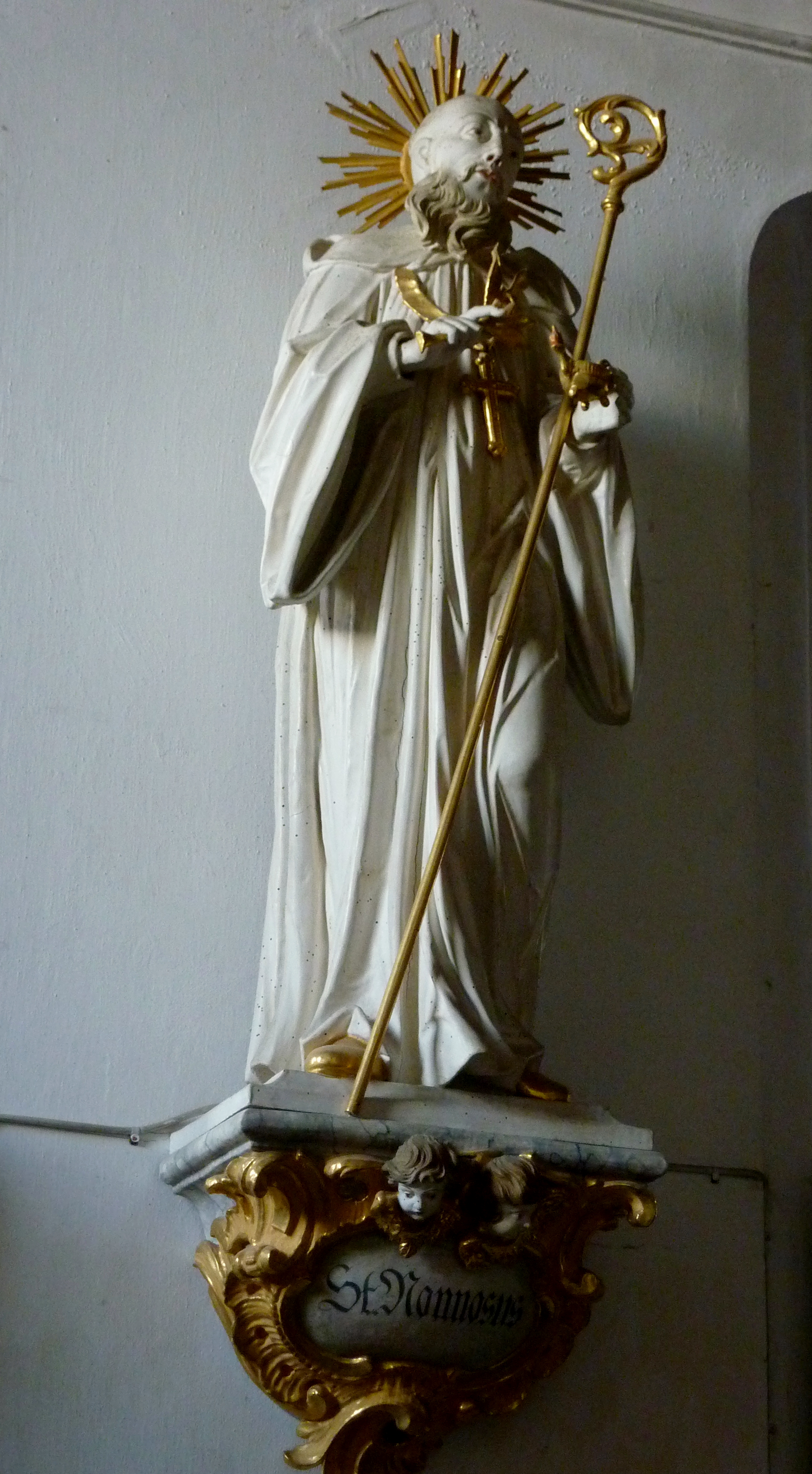 Katholische Pfarrkirche St. Peter und Paul (ehemalige Abteikirche des Klosters Thierhaupten) in Thierhaupten, einer Gemeinde im Landkreis Augsburg, Skulptur des hl. Nonnosus